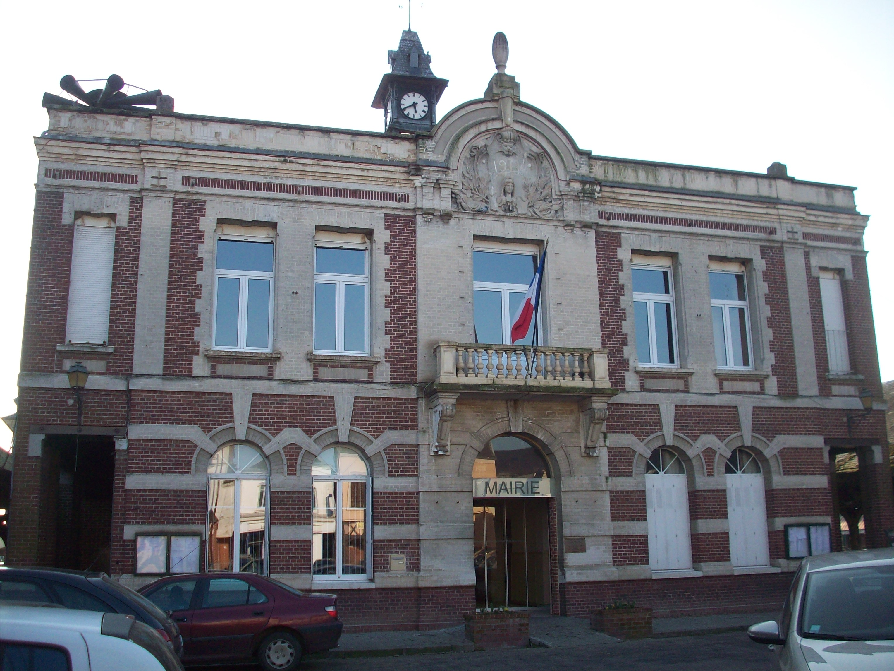 Mairie de Buchy.